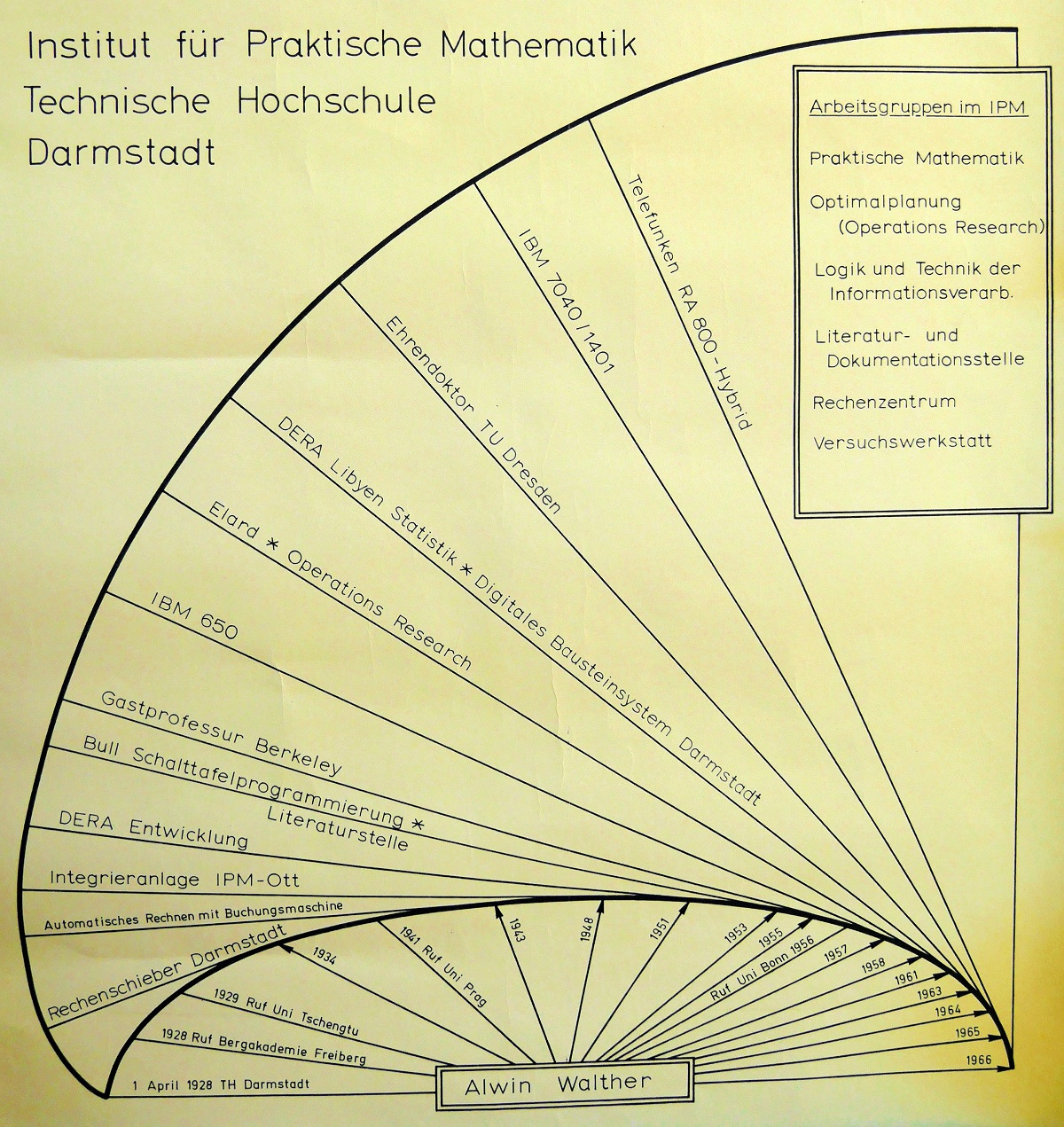 Gedenkblatt zu Professor Dr. Alwin Walther (Darmstadt), nach seinem Tod erstellt.